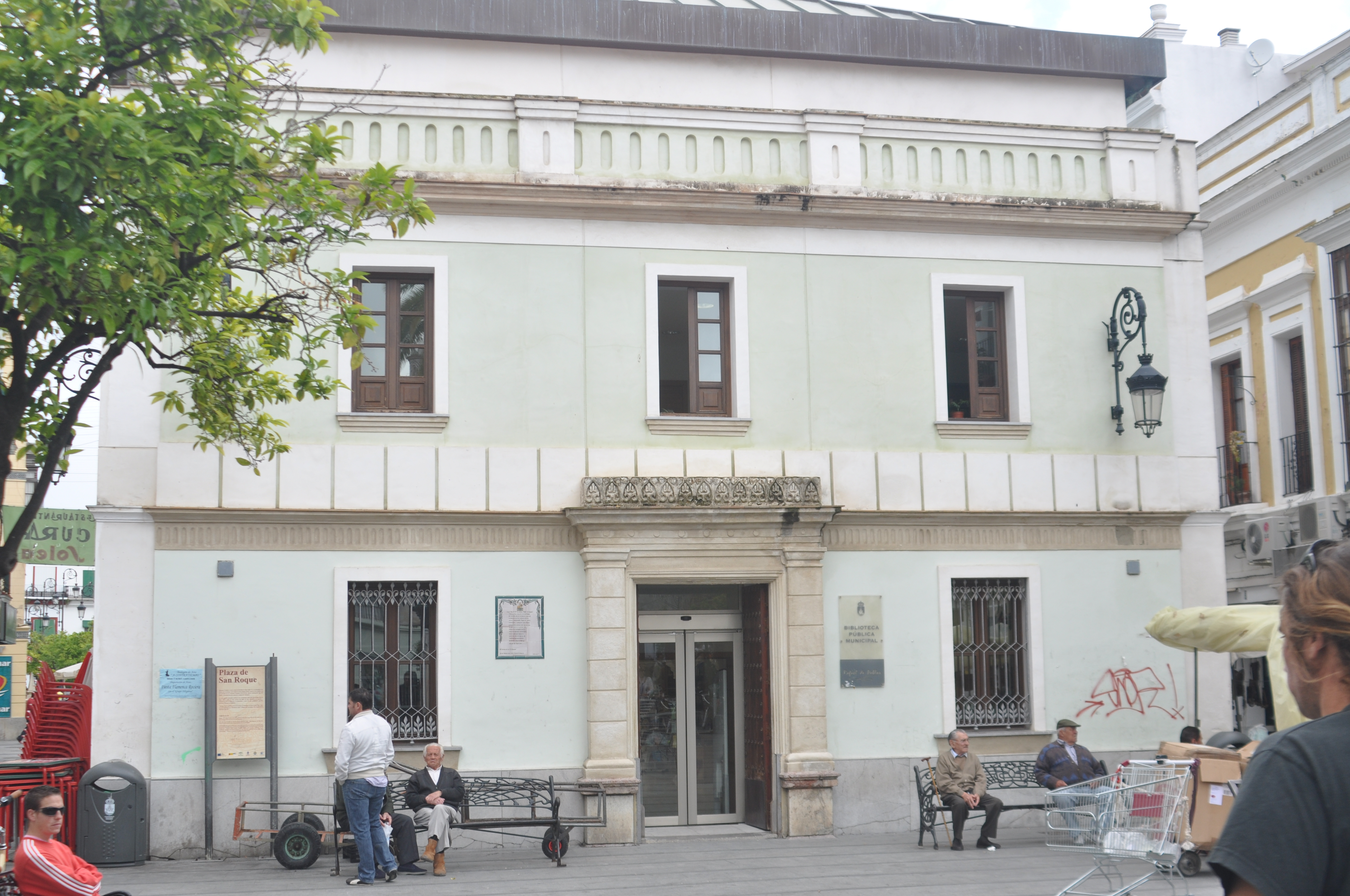 Biblioteca municipal de Sanlúcar de Barrameda. (Cádiz) (España)